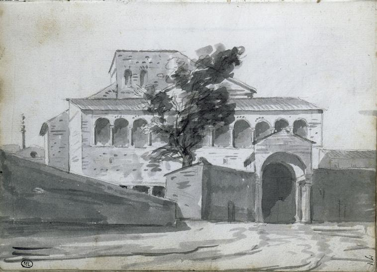 Chiesa di San Saba a Roma, disegno, 18,8 x 14,6 cm, Parigi, Louvre